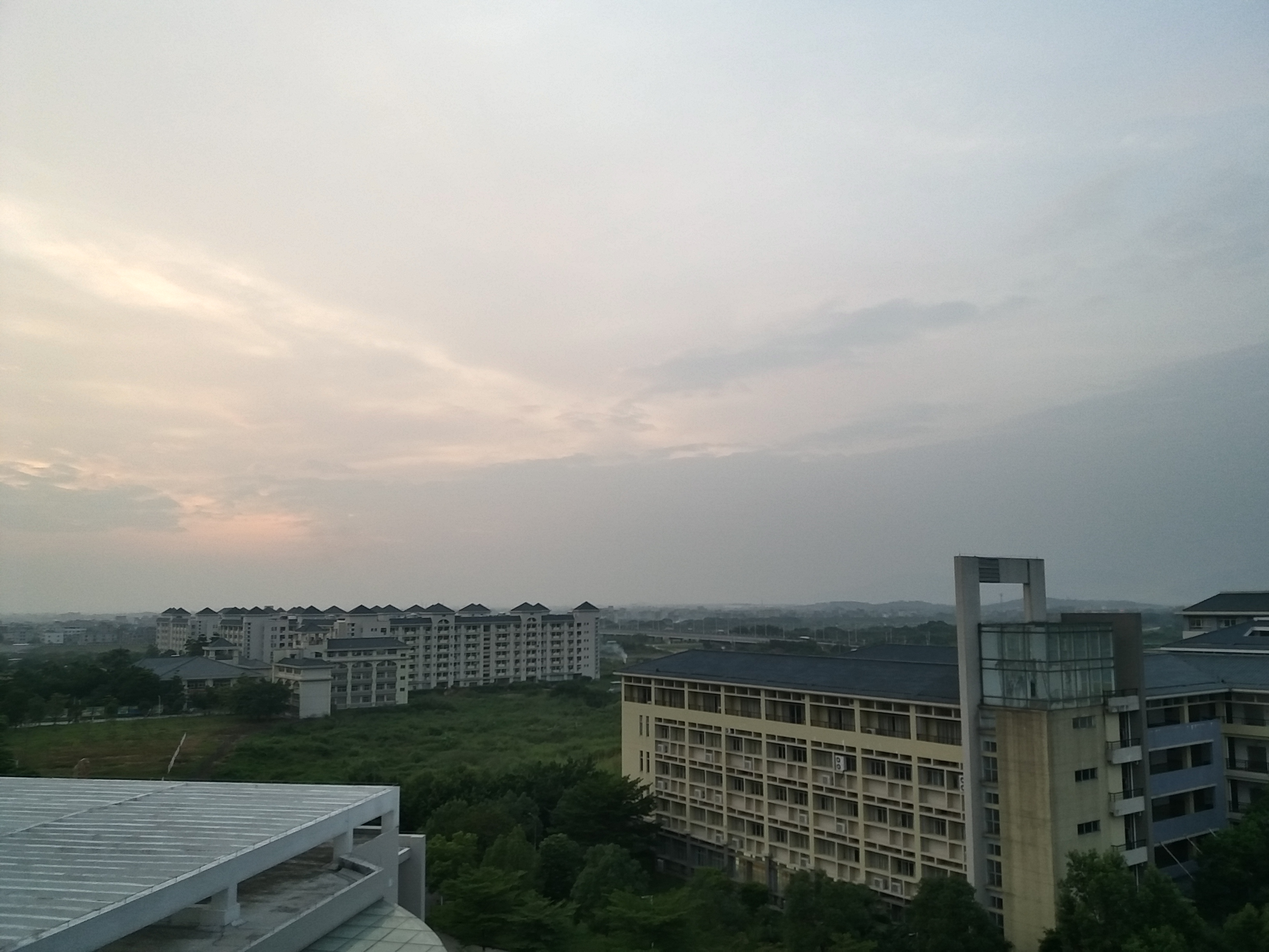 中文（中国大陆）: 远处为学生宿舍